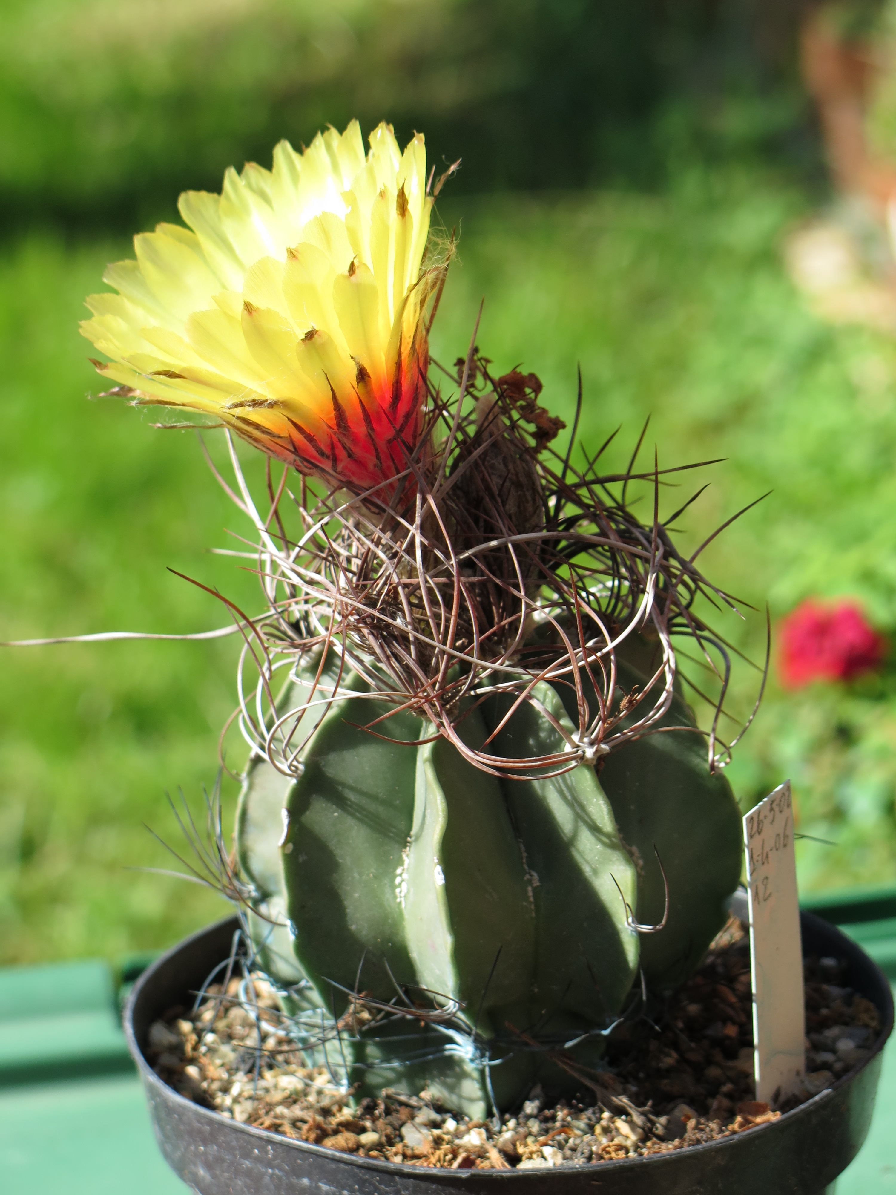 Astrophytum capricorne var. senile in fiore